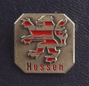 Anstecknadel zum Ehrenbrief des Landes Hessen (1. Modell, achteckig: 1973 bis 1981; 2. Modell, rund)